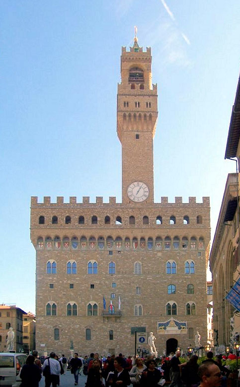 Piazza Della Signoria, Firenze, Italia